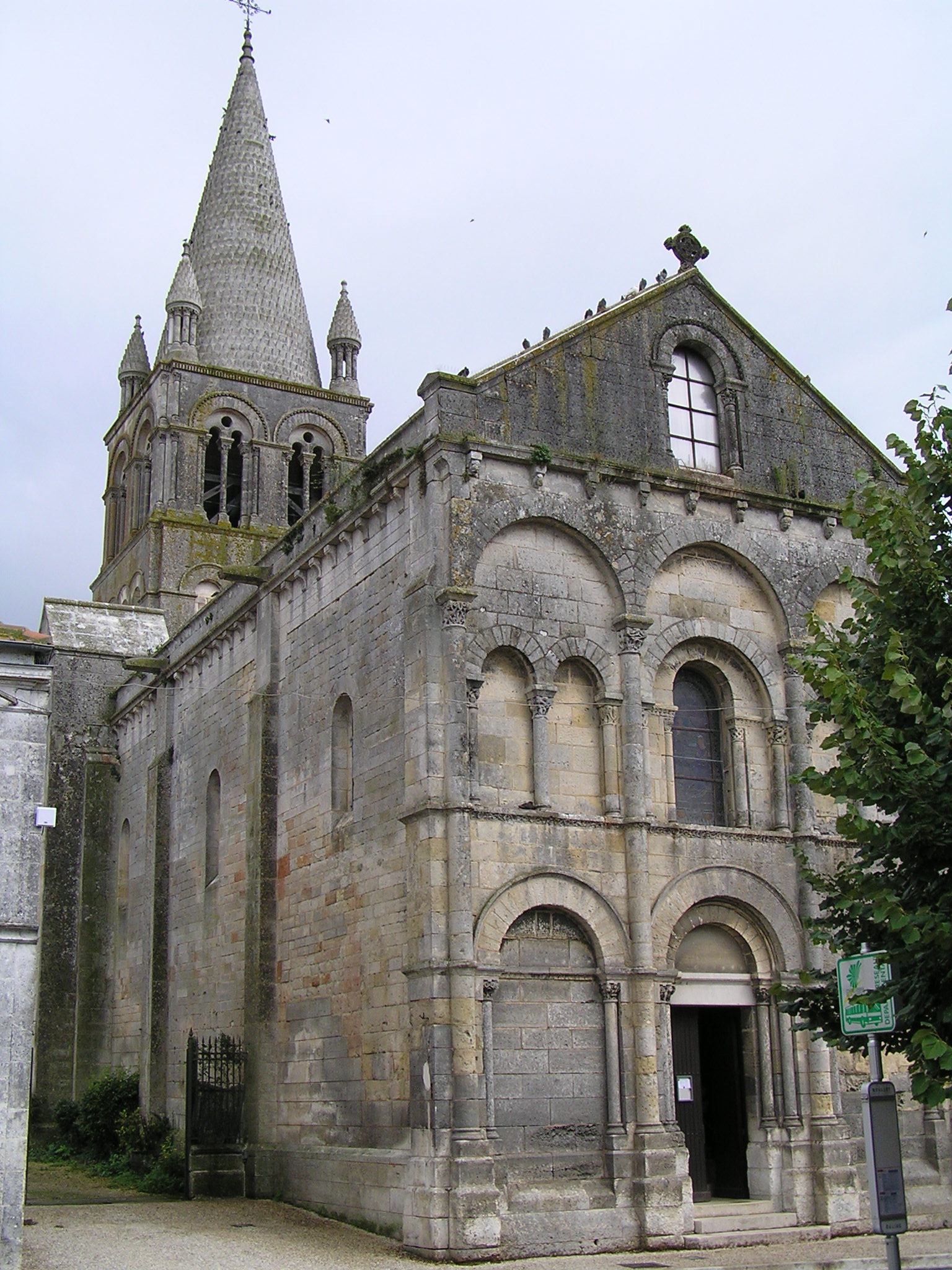 église de Roullet à Roullet-Saint-Estèphe, Charente, France